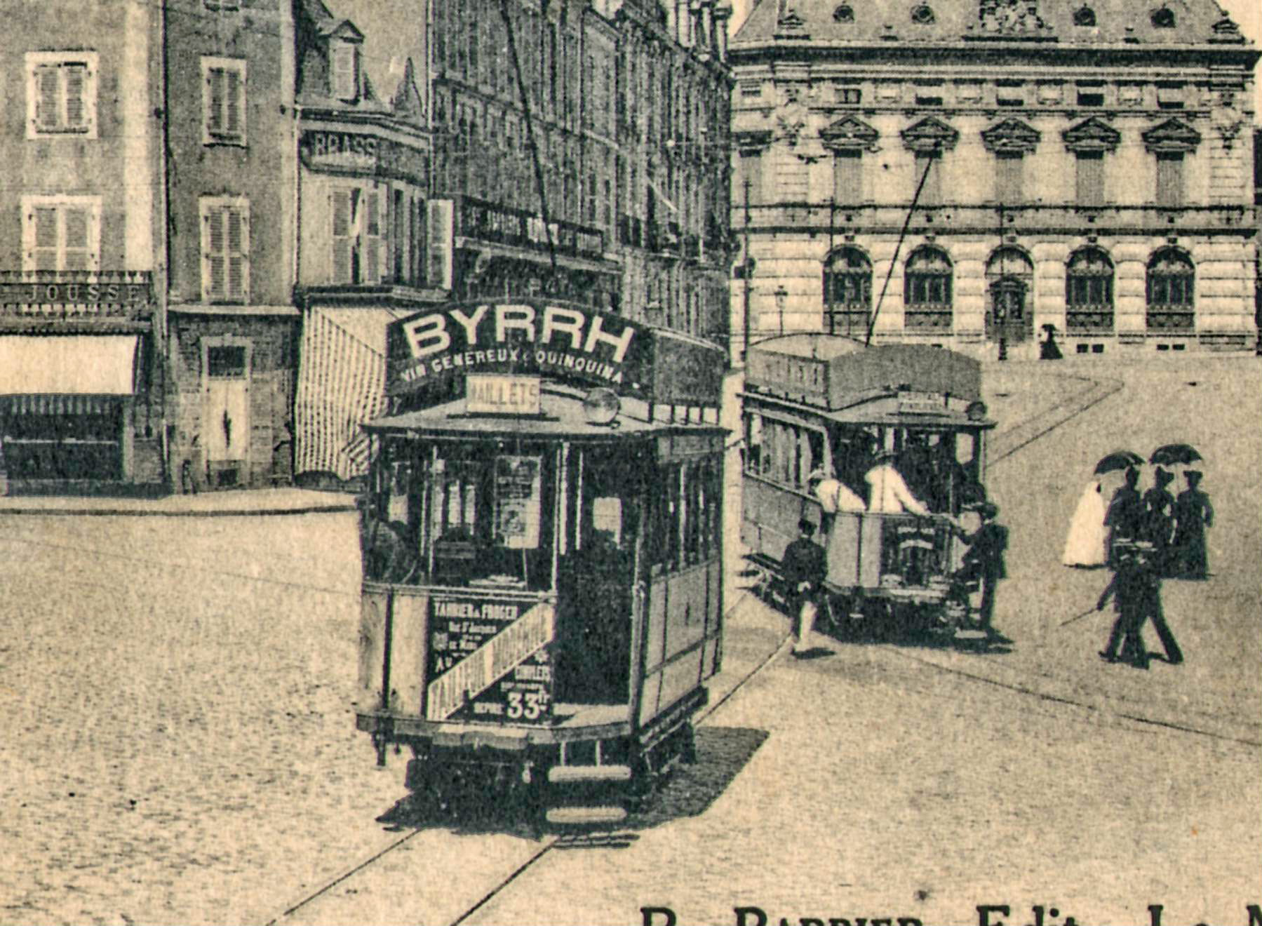 Détail de la carte postale ancienne éditée par ND Phot n°85 & R. Barbier, éditeur au Mans :LE MANS - La Place Thiers et la Caisse d'épargne.Gros plan sur une motrice de la ligne 1 de l'ancien tramway du Mans en direction des Maillets